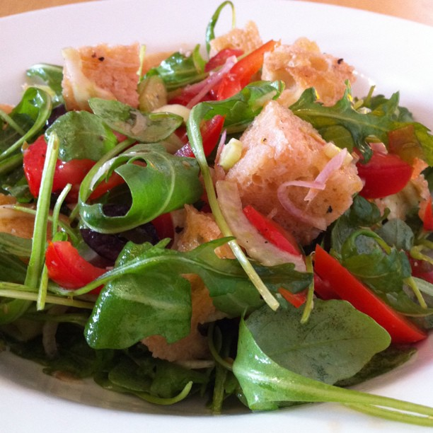 Panzanella